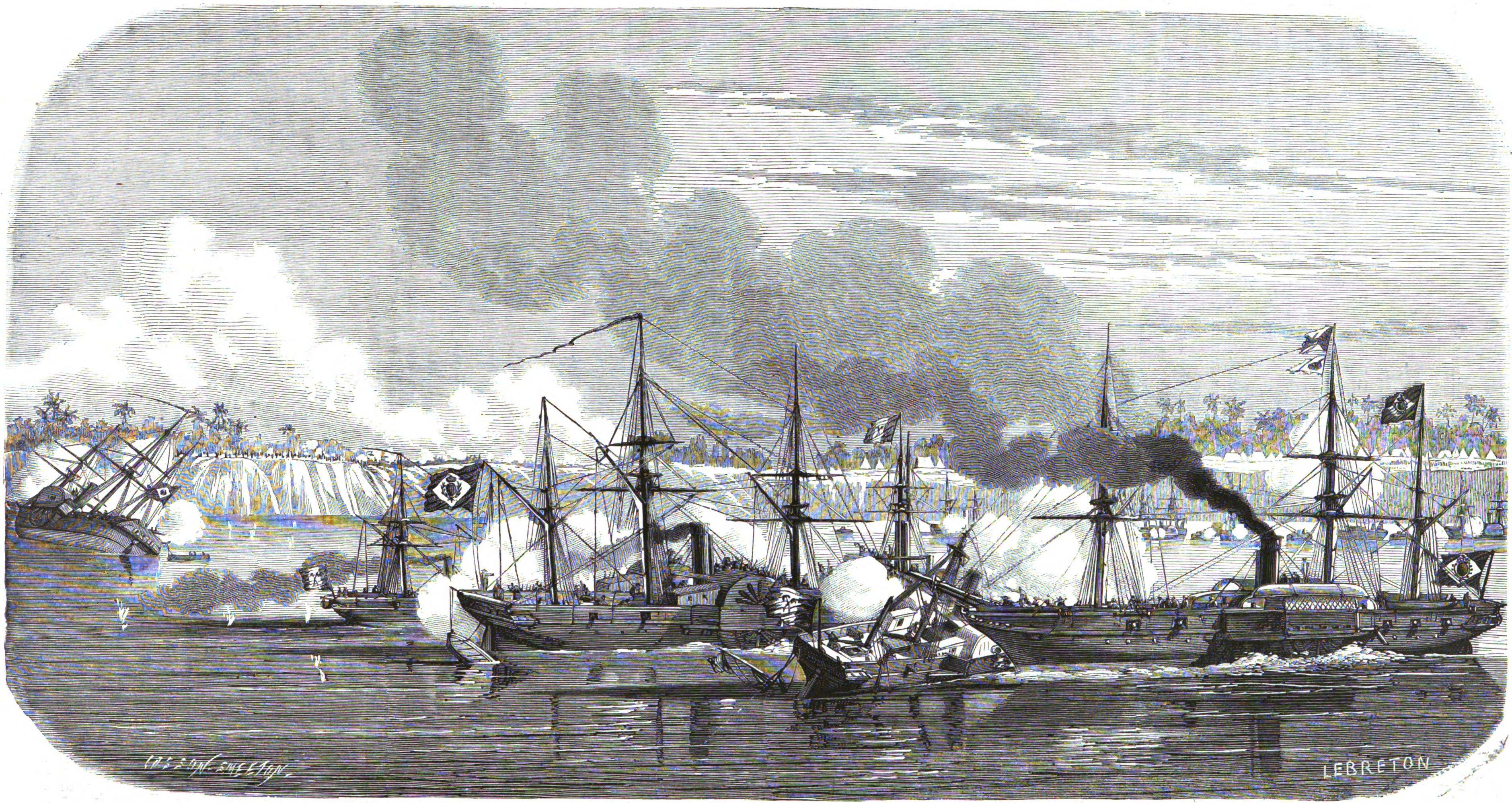 BATAILLE NAVALE DE RIACHUELO, DANS LES EAUX DU PARANA, ENTRE LES ESCADRES BRÉSILIENNE ET PARAGUÉENNE (11 juio). - D'après un dessin envoyé par M. Félix Vogeli.